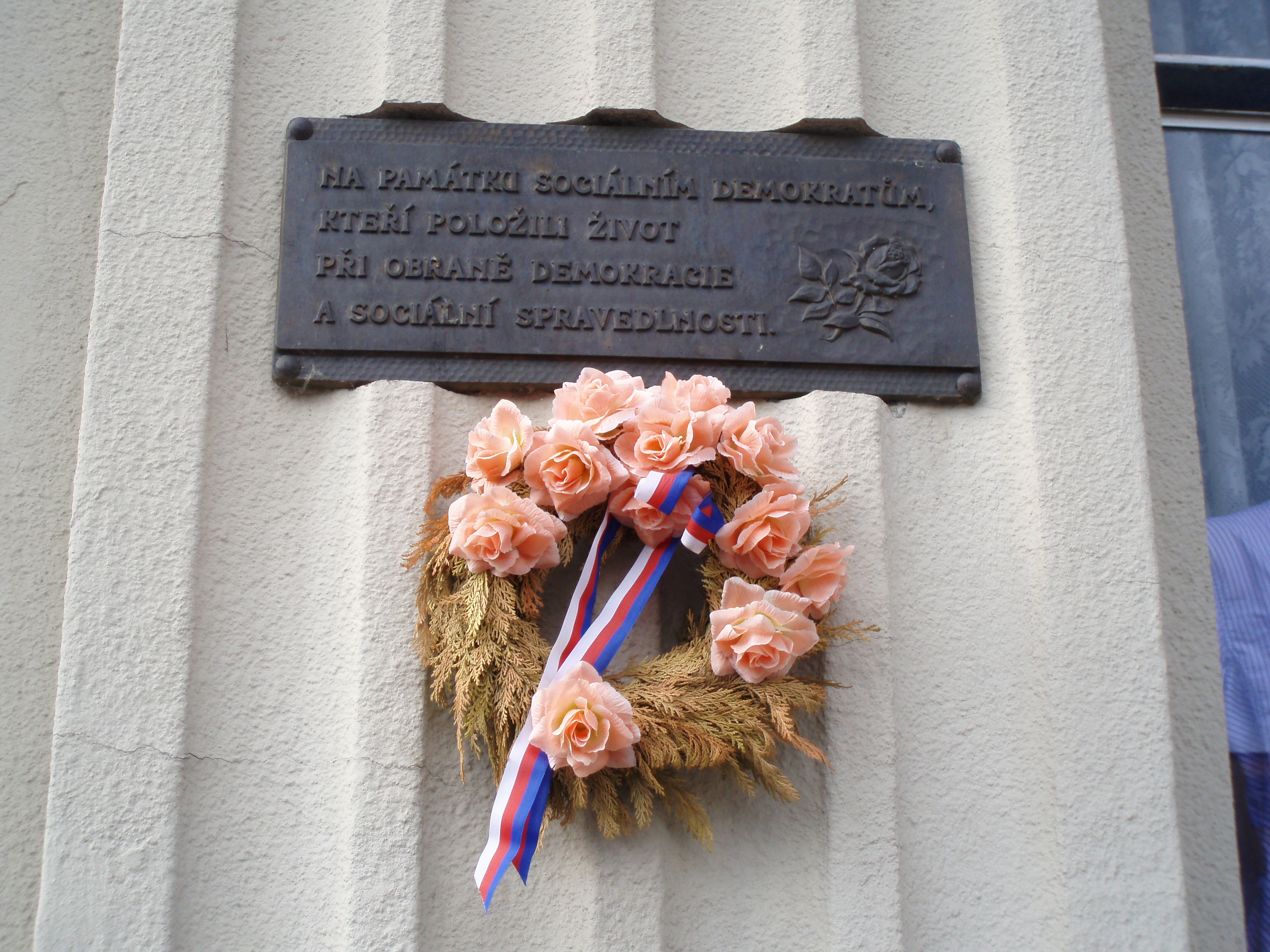 Pamětní deska na KD Střelnice (Hradec Králové)